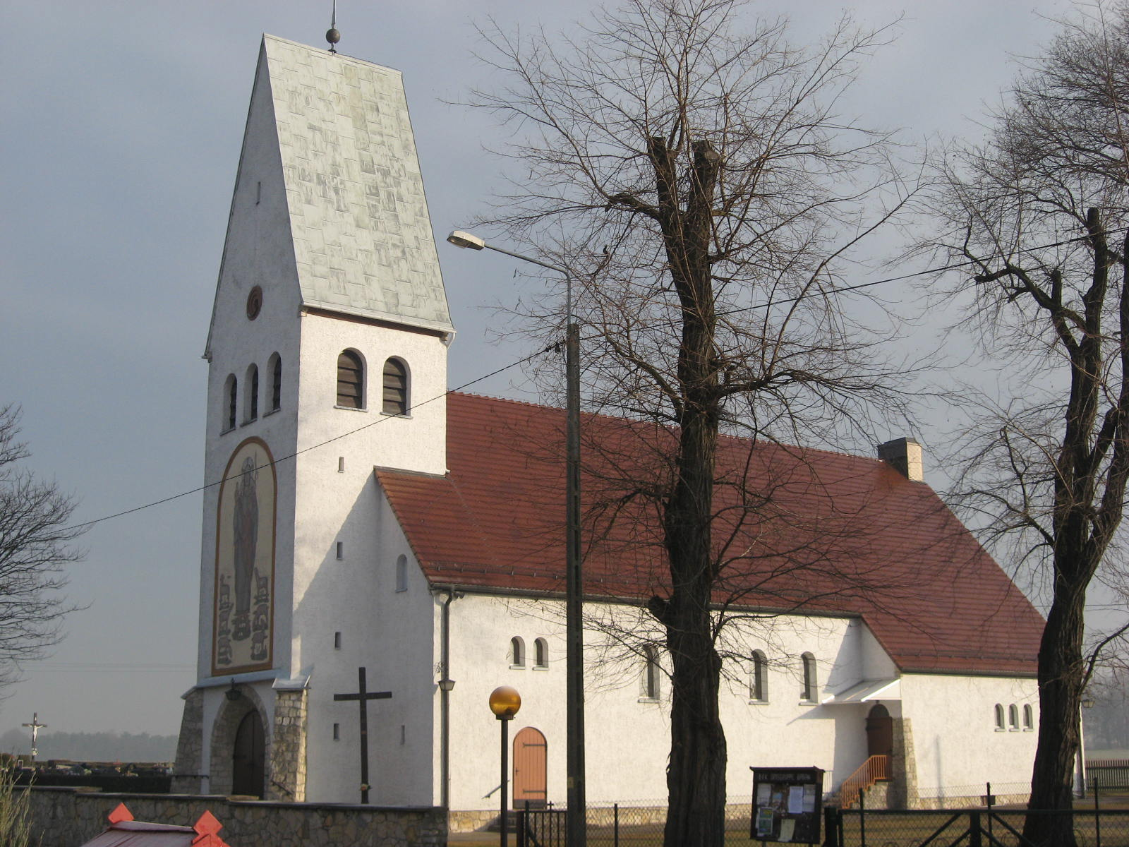 Kościół Chrystusa Króla w Bażanach